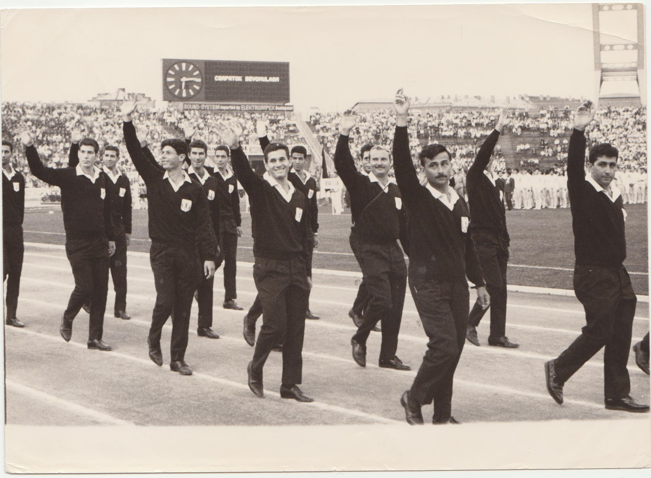 המשלחת הישראלית לאוניברסיאדה בבודפשט, 1965